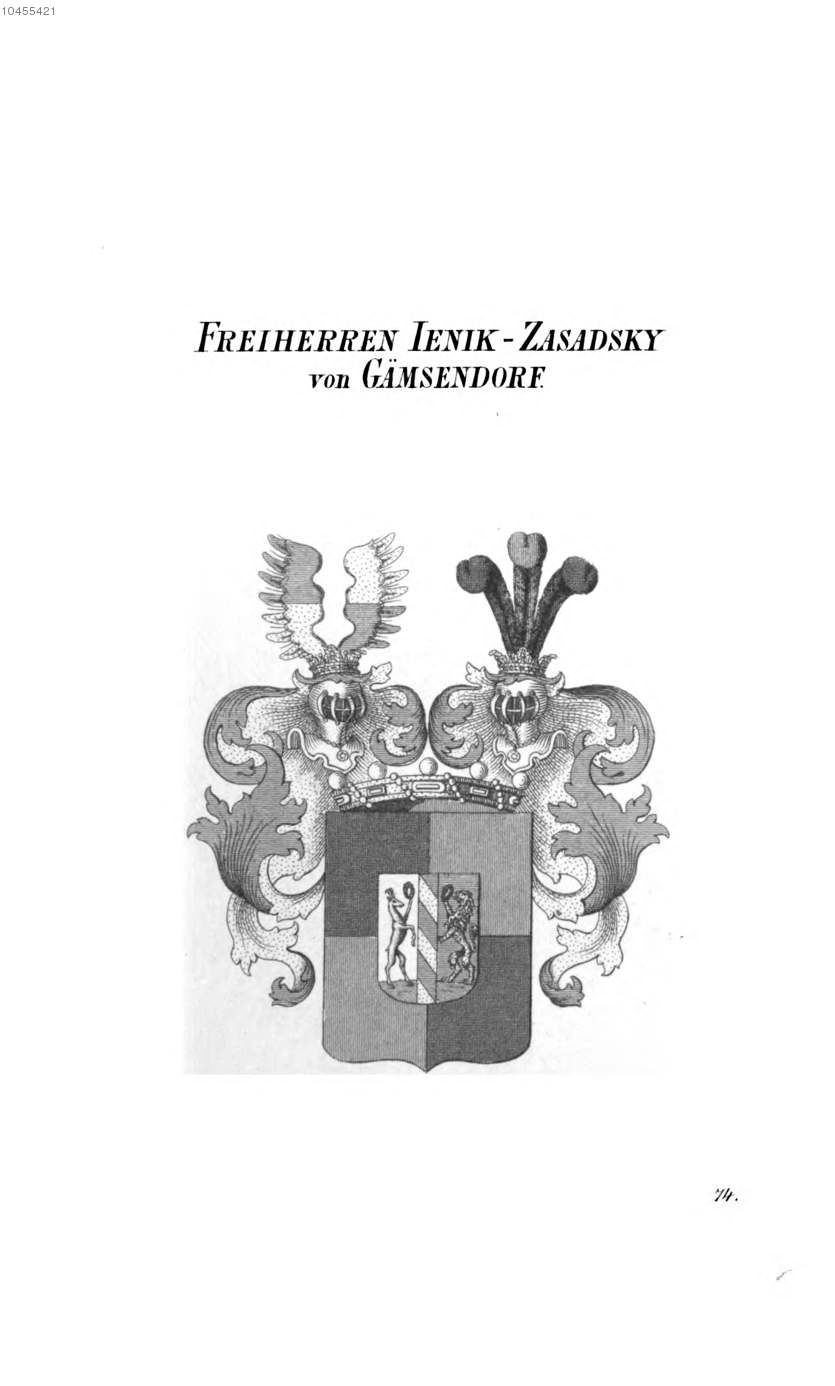 Wappen Jenik Zasadsky von Gämsendorf 2 - Tyroff AT.jpg